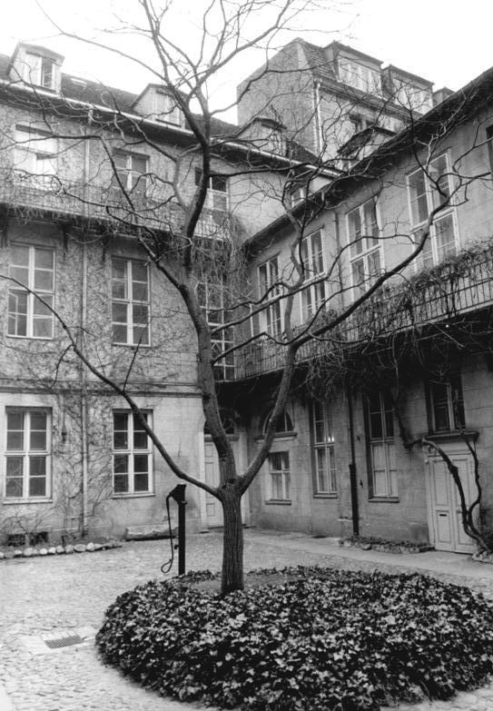 ADN-ZB-Settnik15.3.83-zei-Berlin: Friedrich Nicolai, Schriftsteller, Verleger und Buchhändler, erwarb 1787 das Haus Brüderstraße 13. Er ließ es durch F. Zelter umbauen und noch heute präsentiert es sich nahezu in originaler Form. Der Hof sah ebenso wie das Haus viele berühmte Leute. Nicolais Salon galt als Zentrum des "gelehrten" Berlins. - siehe auch 1983-0316-19,20,22N -"